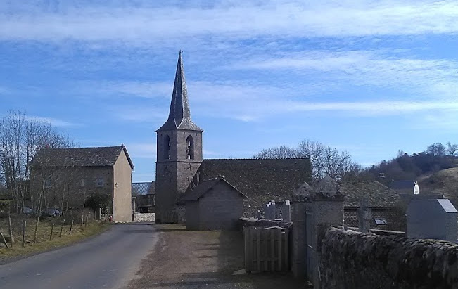 Église du village de Montchanson, ancienne commune de Faverolles (Cantal), commune de Val d'Arcomie, département du Cantal